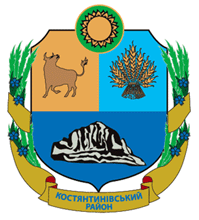 Герб Константинівського району Донецької області